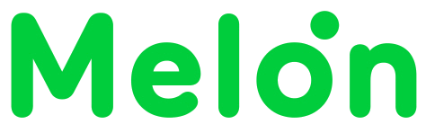 Logo de Melon